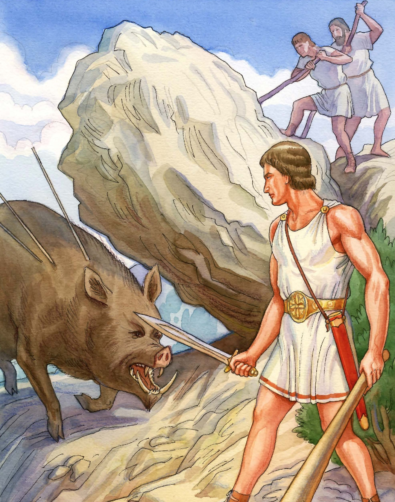 Тесей убивает Кроммионскую свинью. Иллюстрация из книги А.В. Рябинина "Тесей"